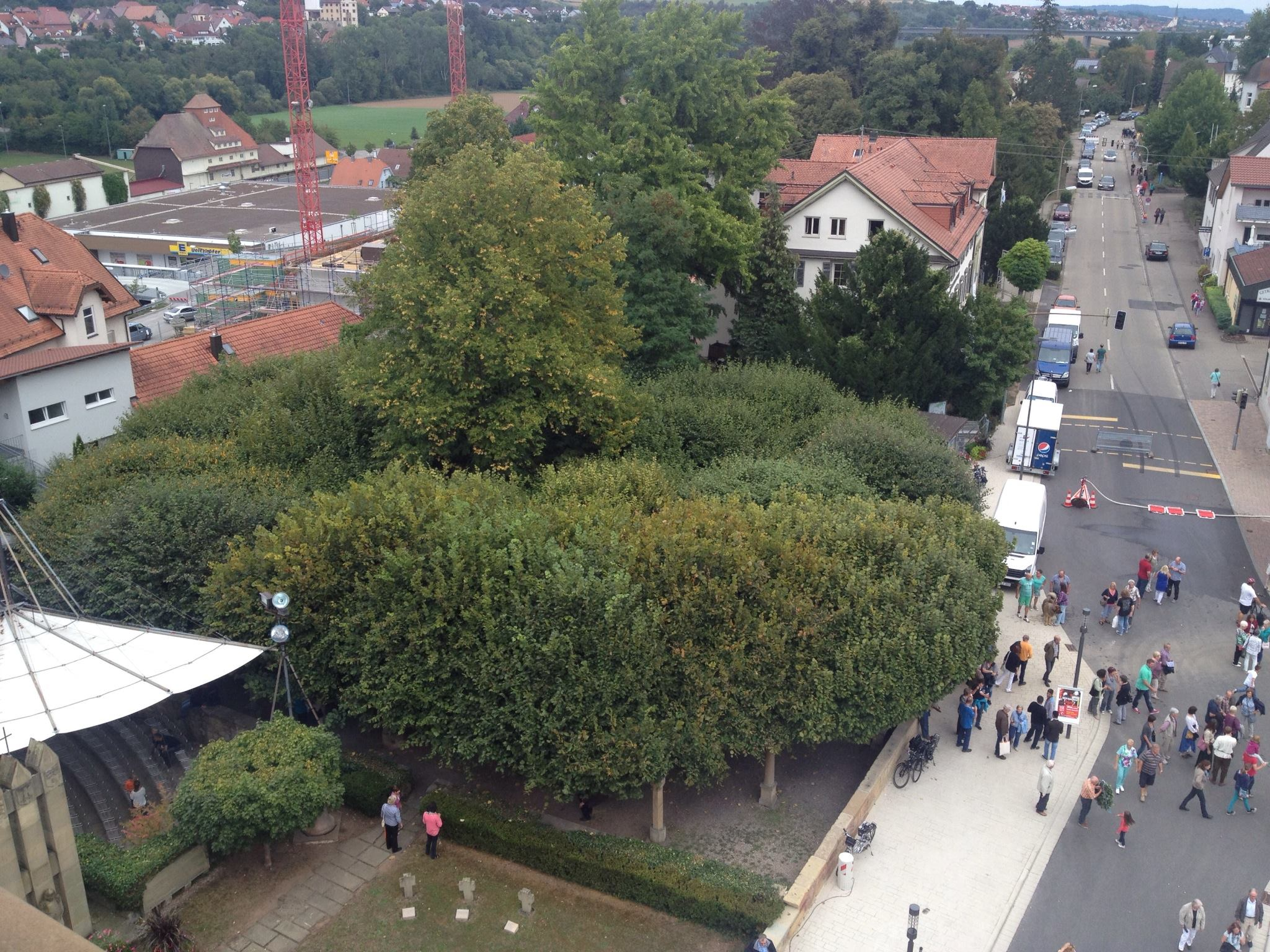 Lindenanlage in Neuenstadt am Kocher vom Oberen Torturm aus gesehen